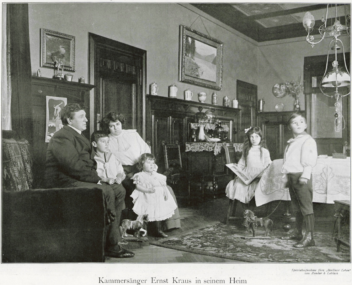 Ernst Kraus, deutscher Kammersänger, mit seiner Familie.